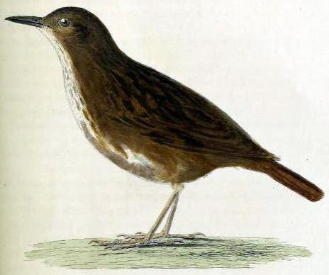 Illustration from Uber die Vogel der Inselgruppe von Boninsima beobachtet zu Anfang May 1828. By von F.H. von Kittlitz. Published in Mémoires présentés à l'Académie Impériale des Sciences de St. Petersbourg par divers Savants et dans ses Assemblées. Tome 1: 231-248. (1831)